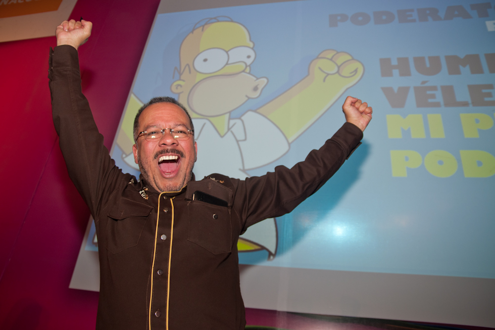 Humberto Vélez